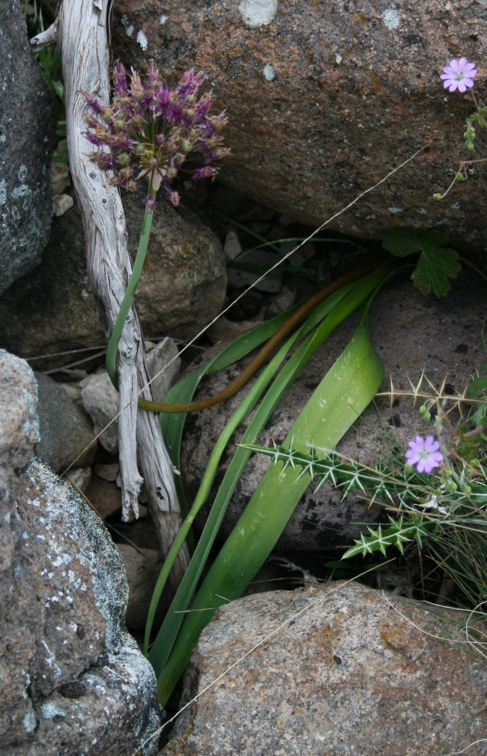 Allium cyrilli subsp. asumaniae, Amaryllisgewächse (Amaryllidaceae), Lauchgewächse (Allioideae) - Türkei/Türkiye/Turkey: Prov. Bolu/Bolu ili, Köroğlu Dağları, an der Straße ca. 4,5 km WNW Karaköy, WNW Kıbrıscık, ca. 1250 m s.m.